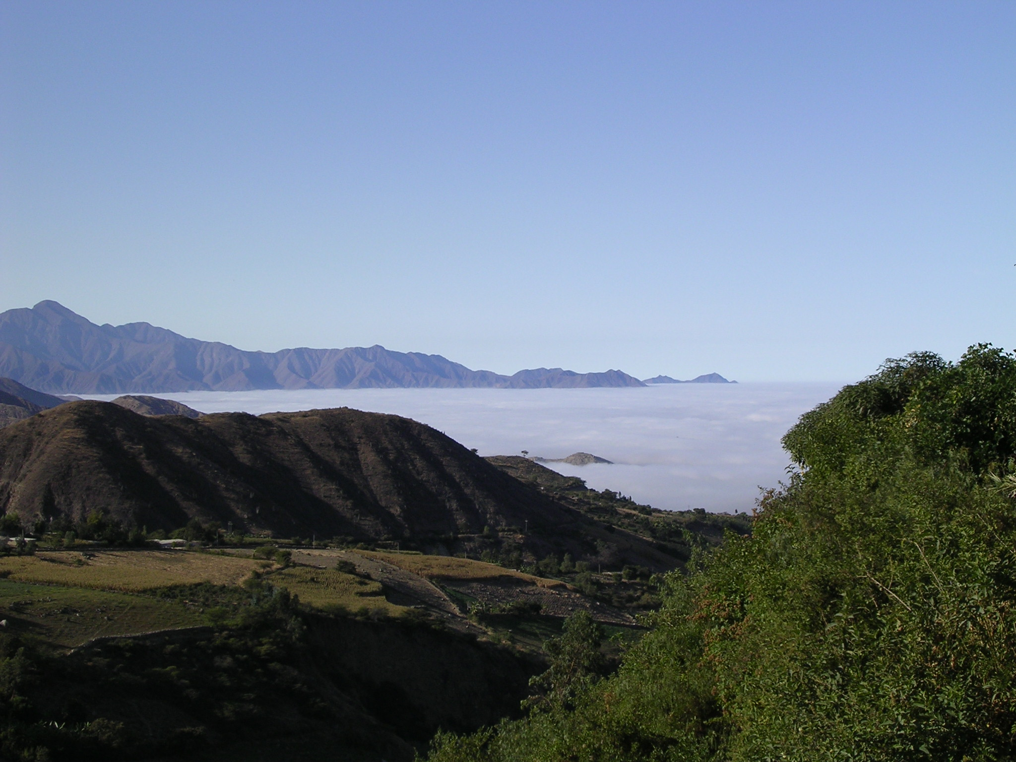 Cuando en la costa peruana es invierno, en Jimbe hace un cielo abierto, pues está sobre el nivel de las nubes.